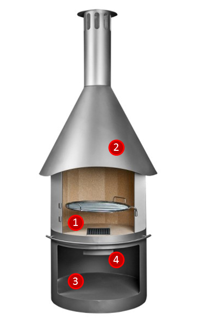 Allgemeiner Aufbau eines Grillkamins aus Edelstahl bestehend aus Feuerkammer (1), Rauchfang (2), Unterbau (3) und Aschekasten (4).